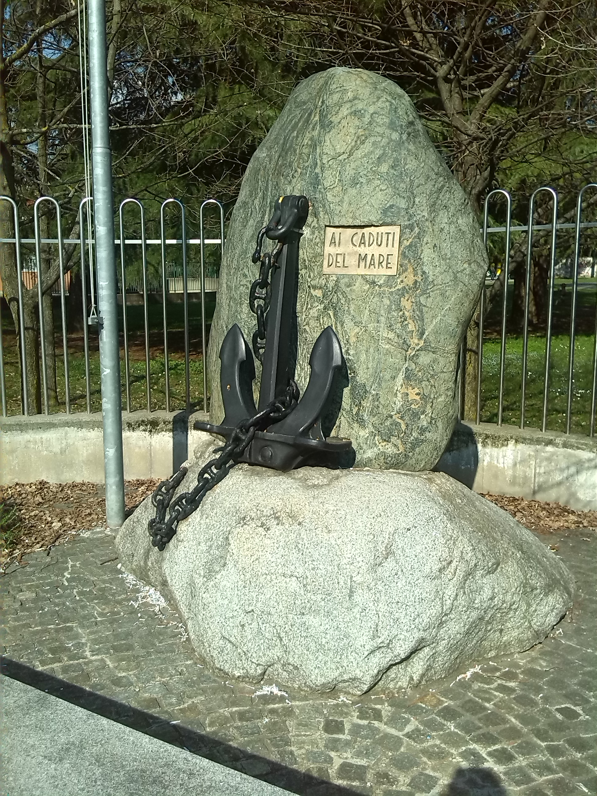 Il monumento ai caduti del mare presso il parco Giosuè Carducci in località Buon Gesù, comune di Olgiate Olona.